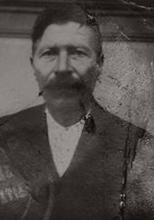 Христос Токас